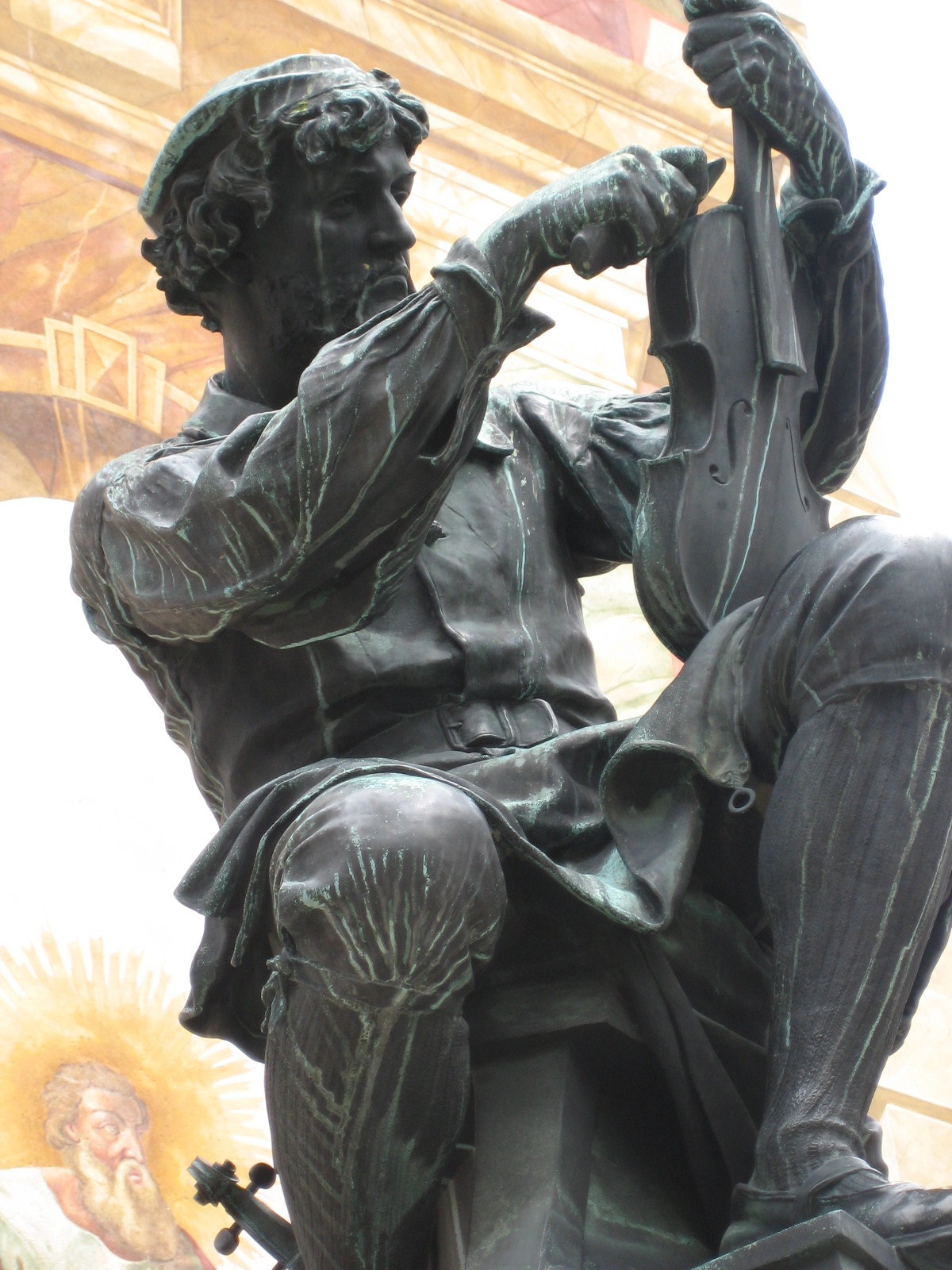 Denkmal für den Geigenbauer Matthias Klotz in Mittenwald, vor der Kirche St. Peter und Paul